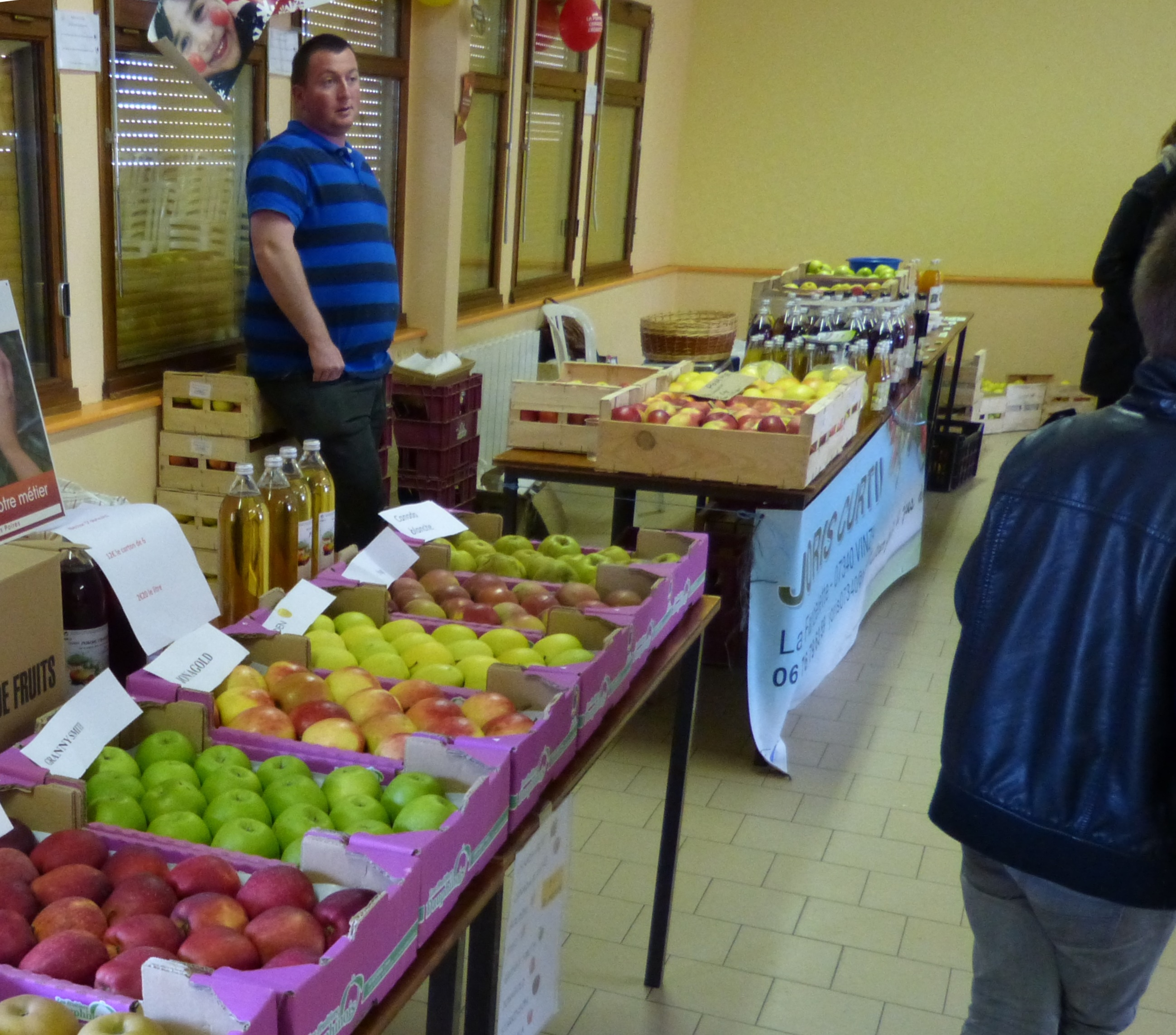 Charnas détail